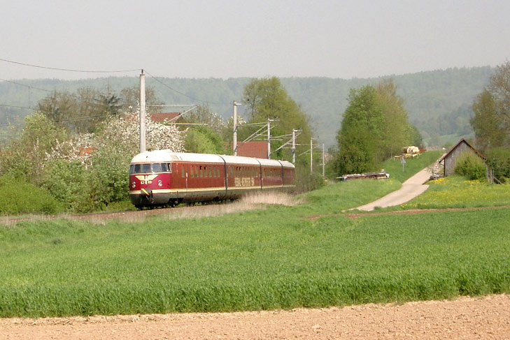 WM-Fanzug "Bern" in Oppenweiler-Zell